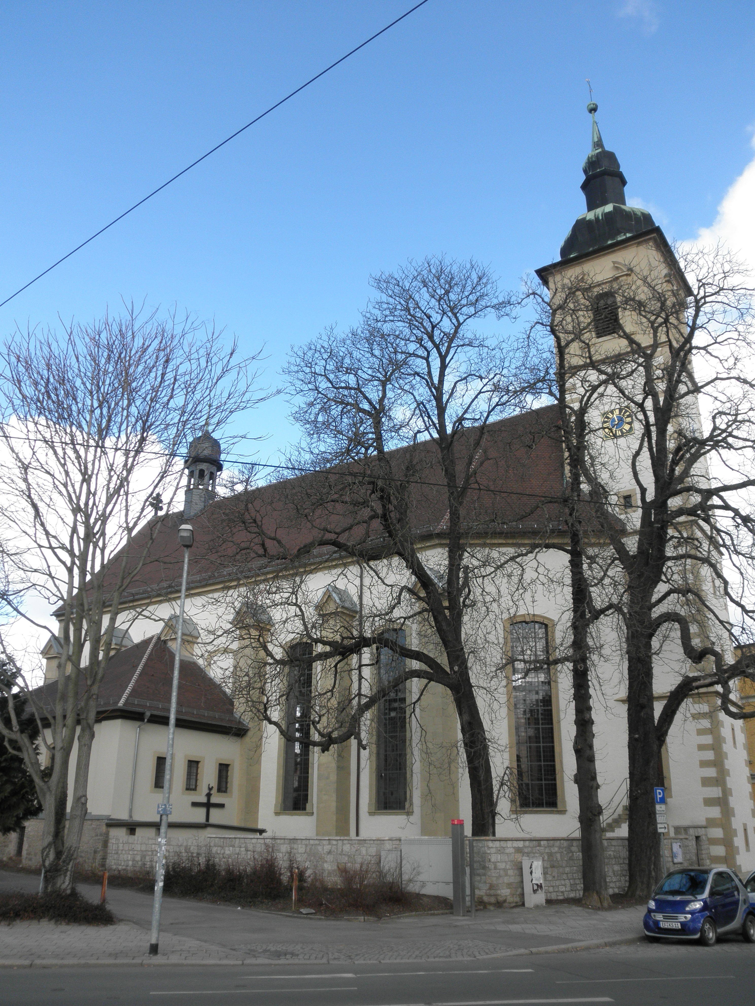 Neuwerkskirche Erfurt